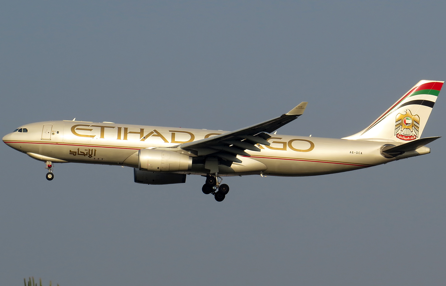 VGHS 2017: RWY32 landing.